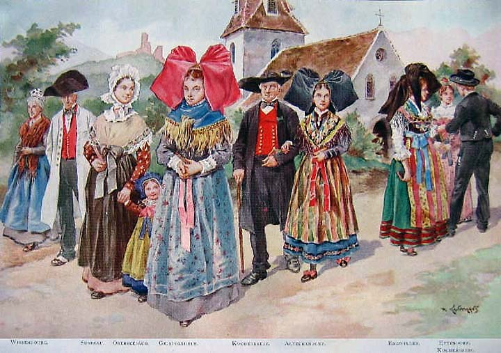 elsässische Trachten